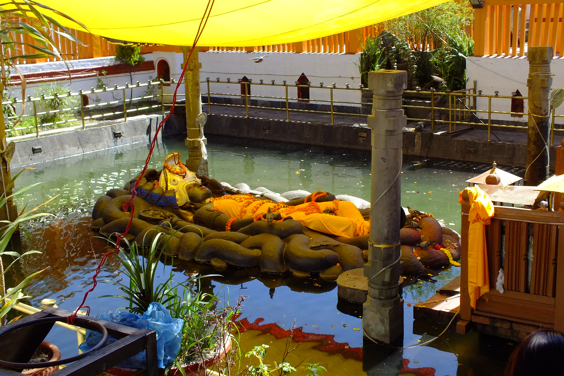 2015-3 Budhanilkantha,Nepal ブダニールカンタ寺院